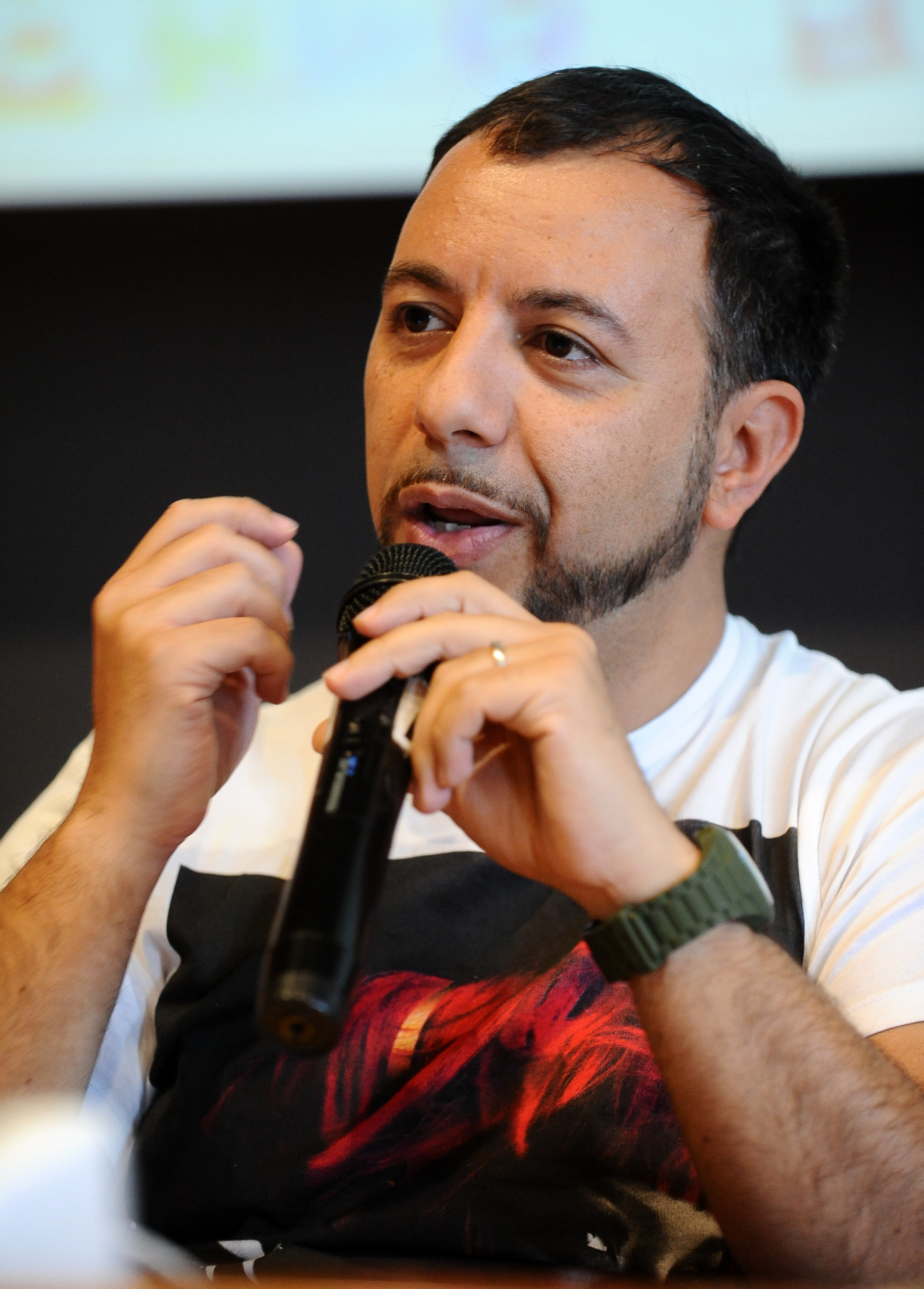 Il DJ Amerigo Provenzano a Pisa all'edizione 2012 Festival delle Radio Universitarie.